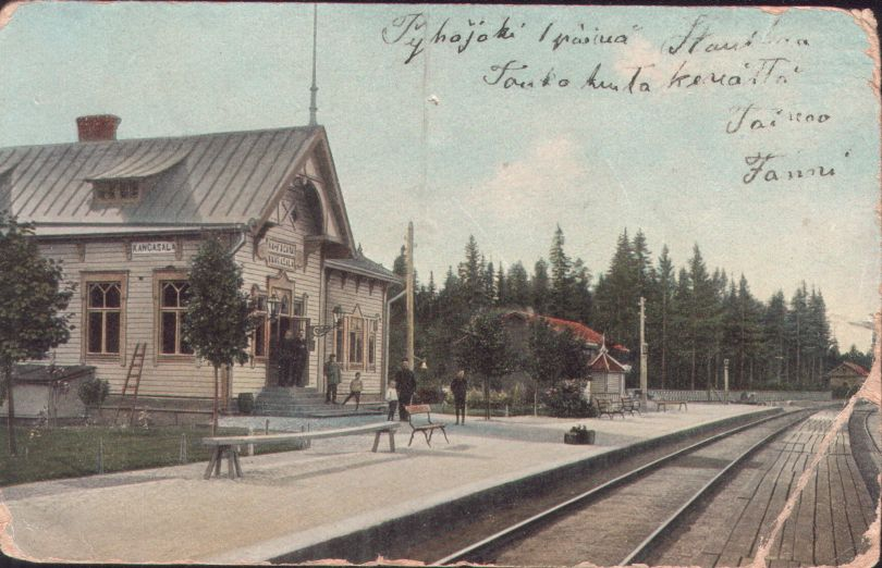 Kangasalan rautatieasema 1900-luvun alussa